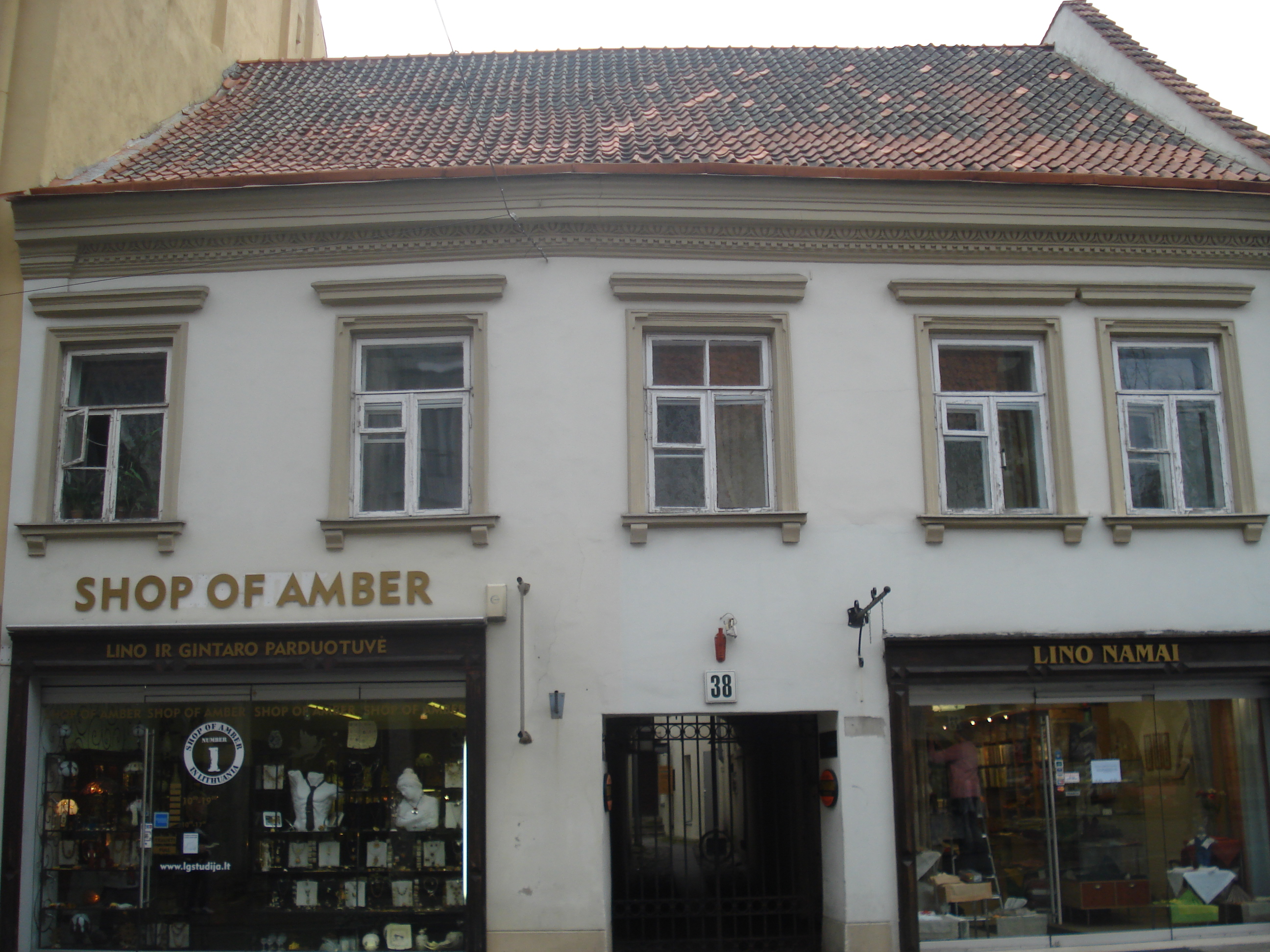 Pilies street in Vilnius (Pilies g. 38, former bookstore of Syrkin)